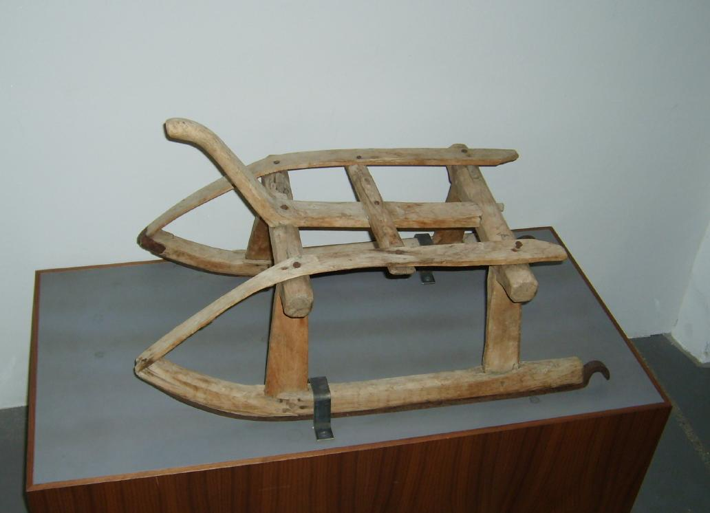 Historischer Zipflschlitten, etwa 2.Hälfte 19.Jhd.